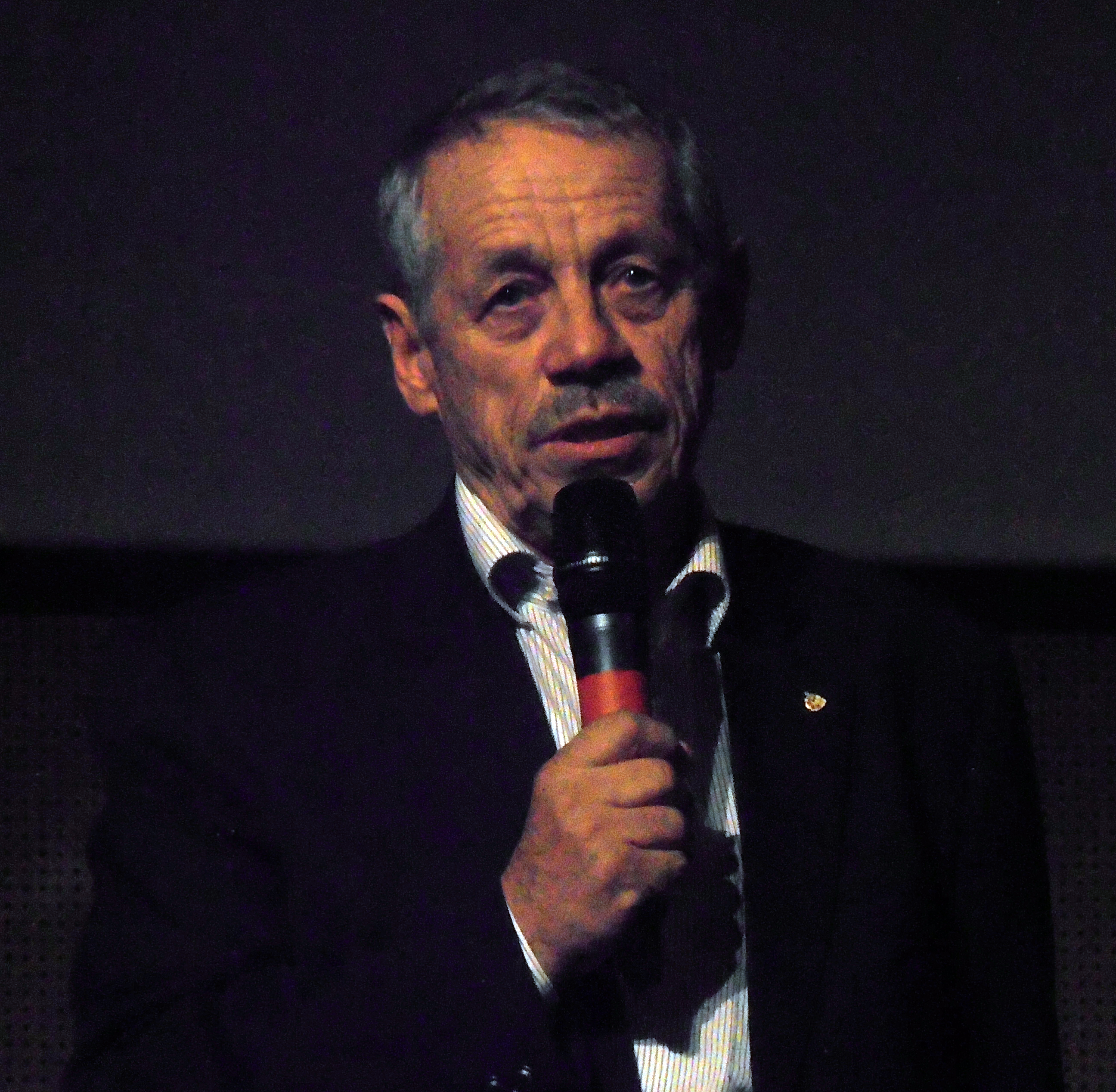 Karl Gabl, Alpinmesse Innsbruck 2012